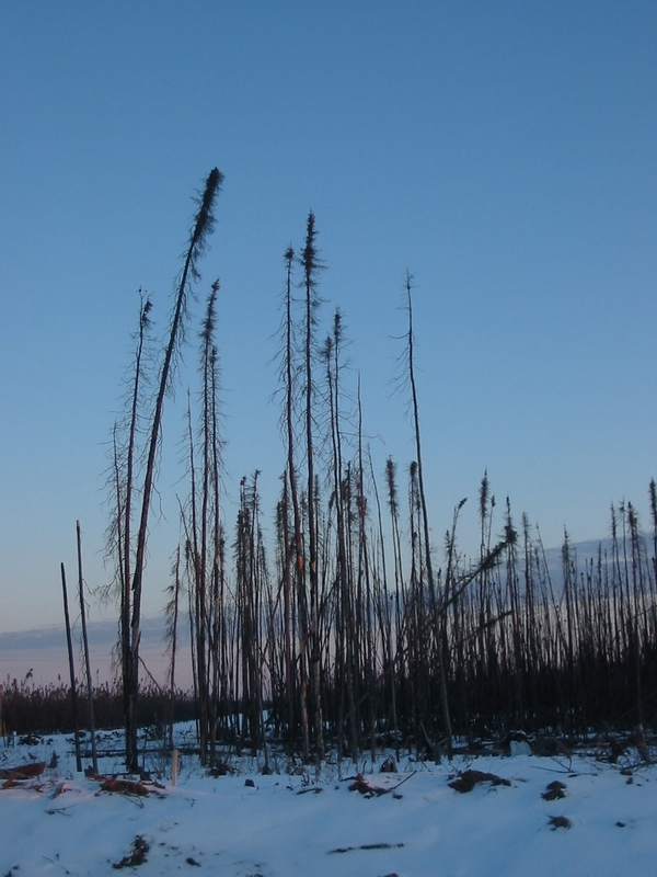 Lodaçal tauga com Picea mariana (espruce preto) essa foto é legal